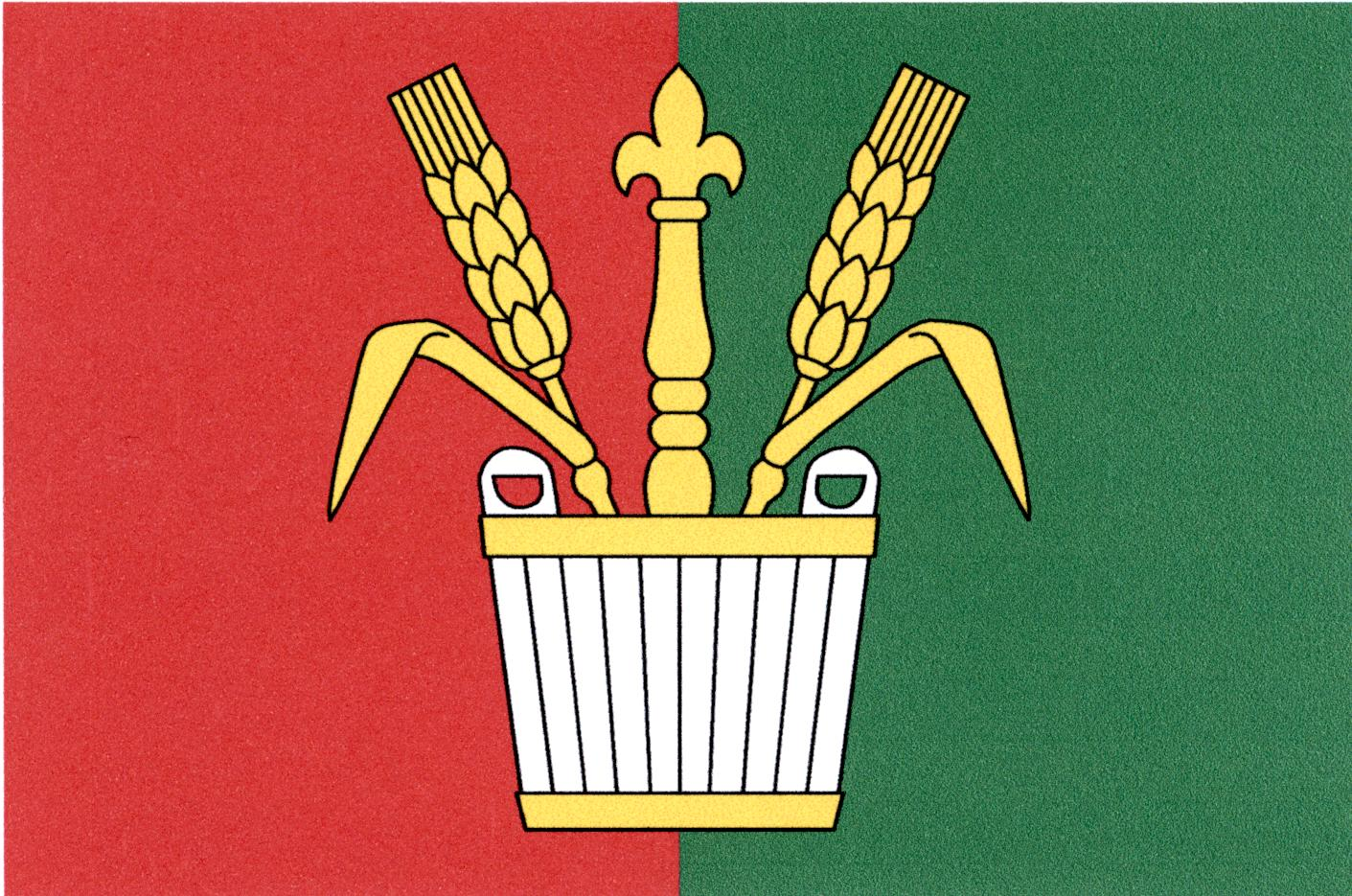 Vlajka obce Keblice